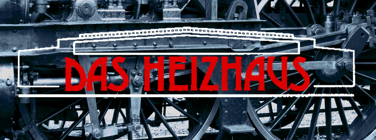 310.23 Hinter Heizhaus Logo